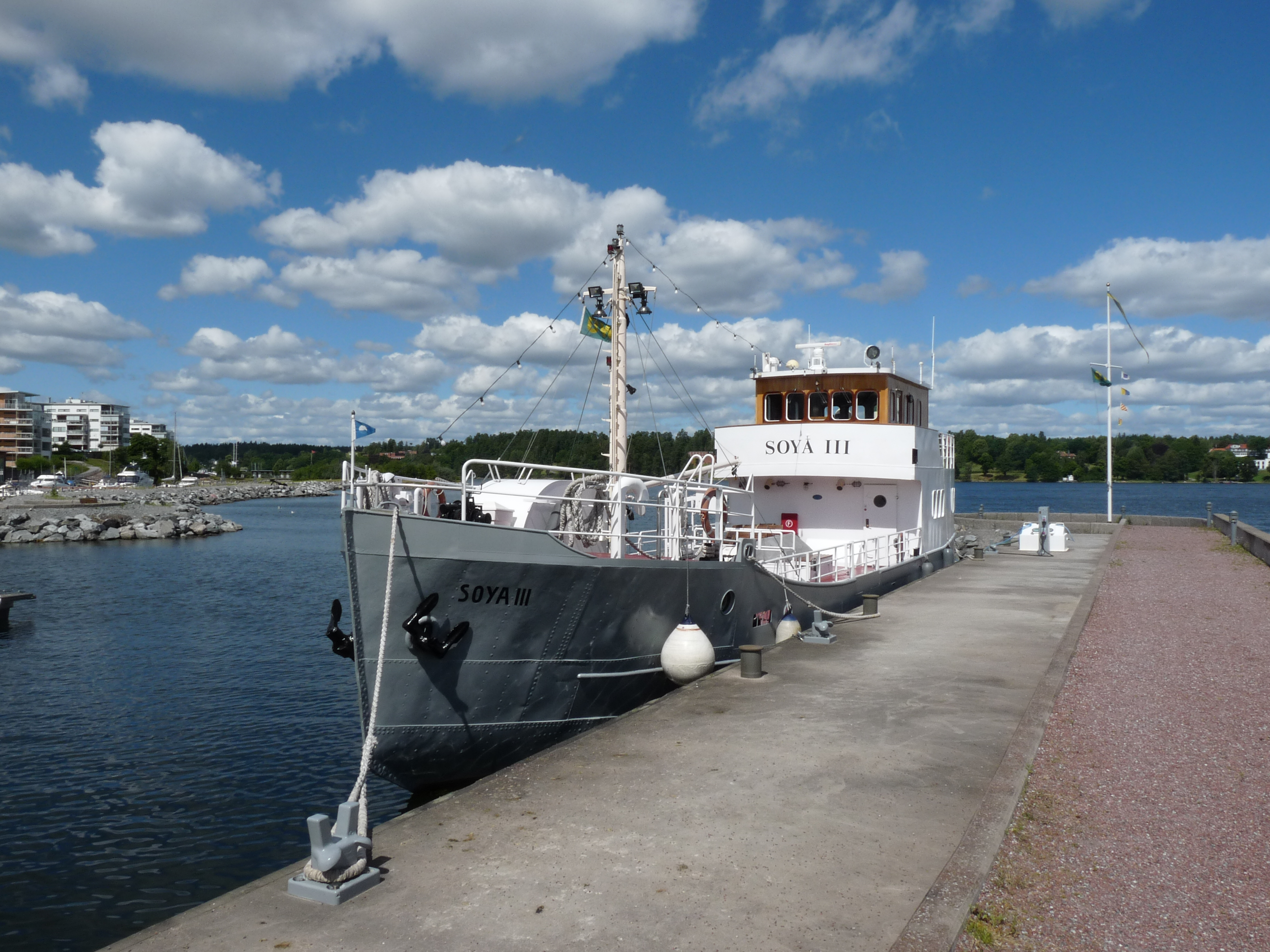 Het museumschip Soya III in Gåshaga